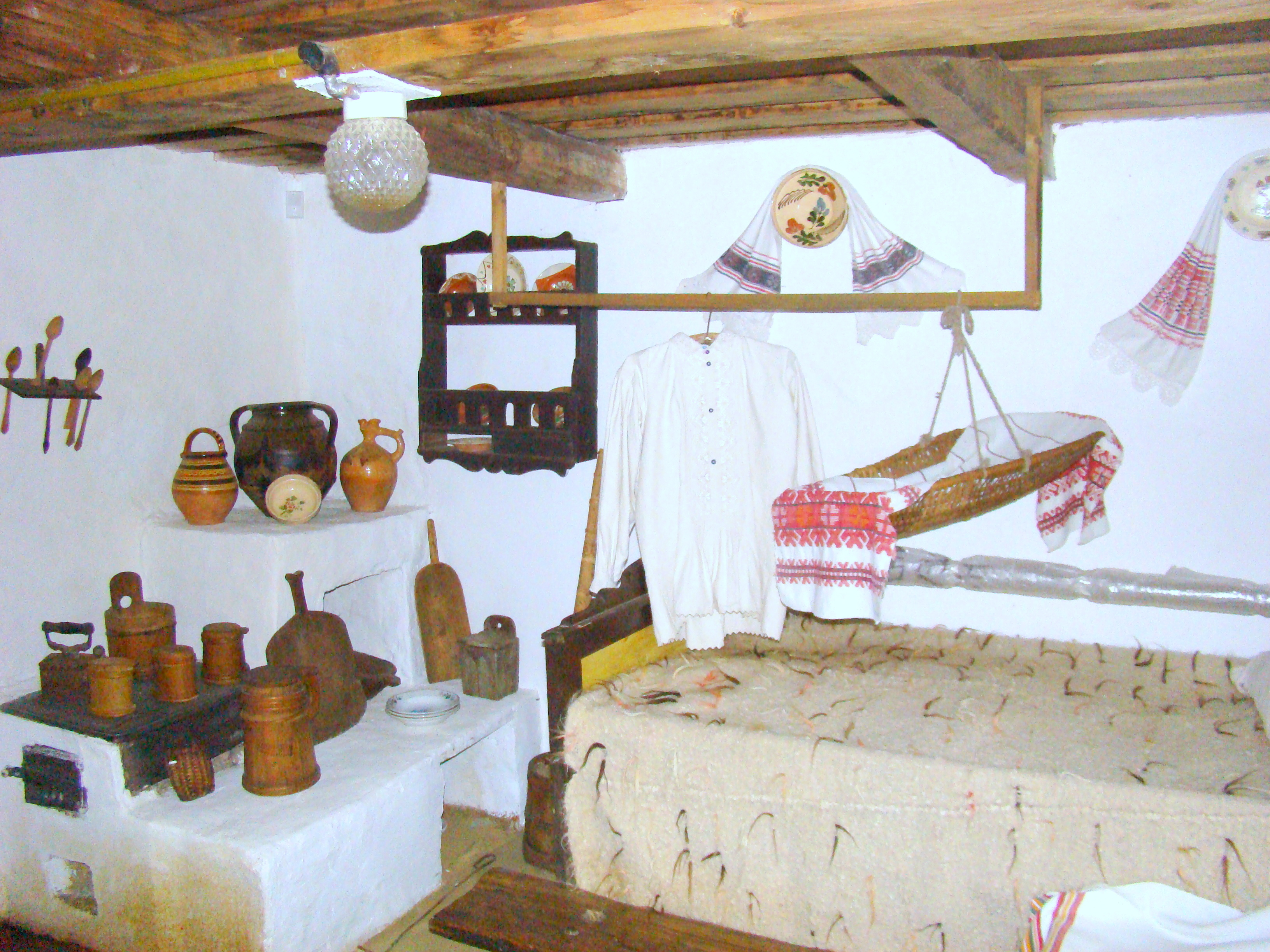 Casa natală Crişan (Marcu Giurgiu)